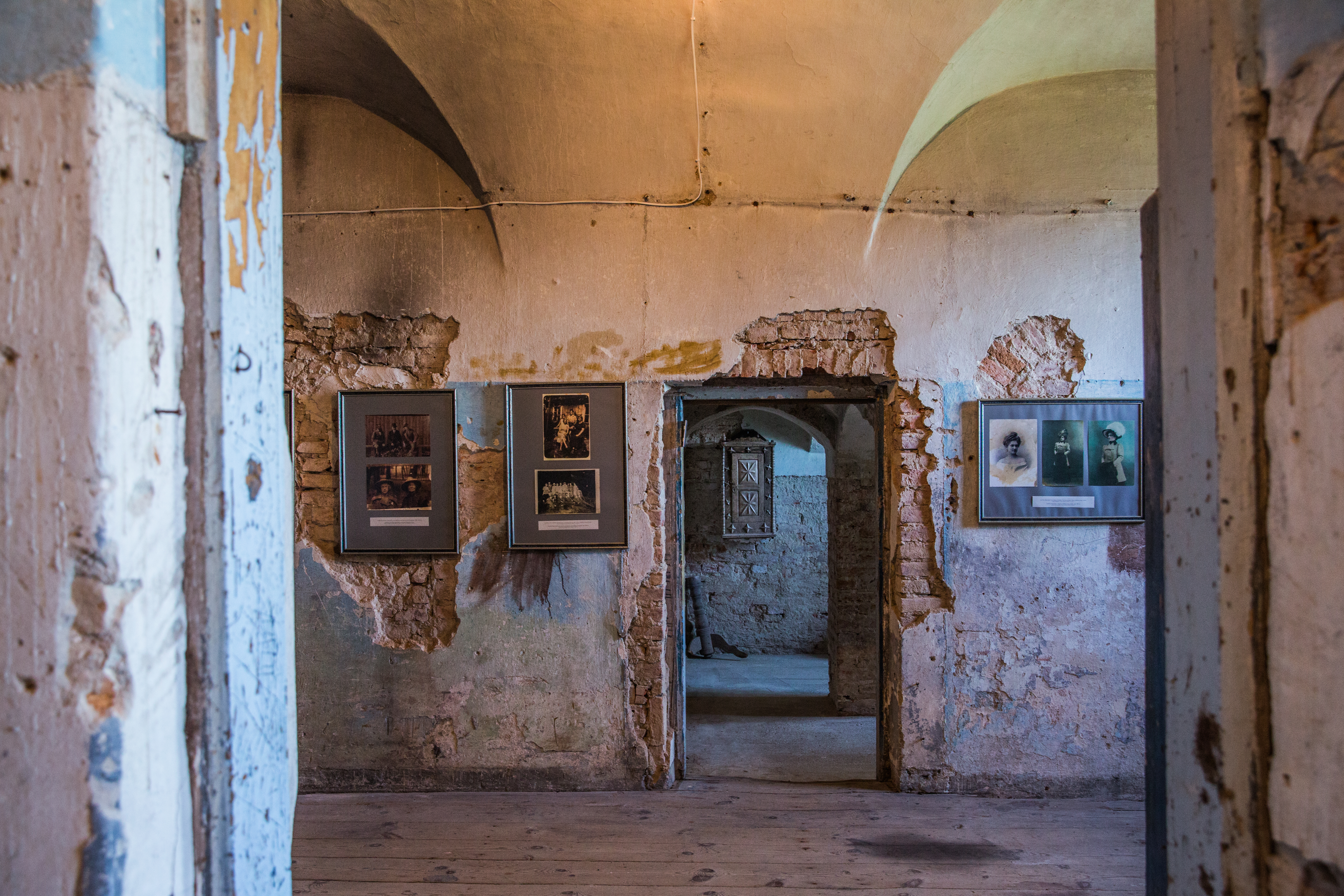 Žemaičių vyskupystės muziejus Varniuose